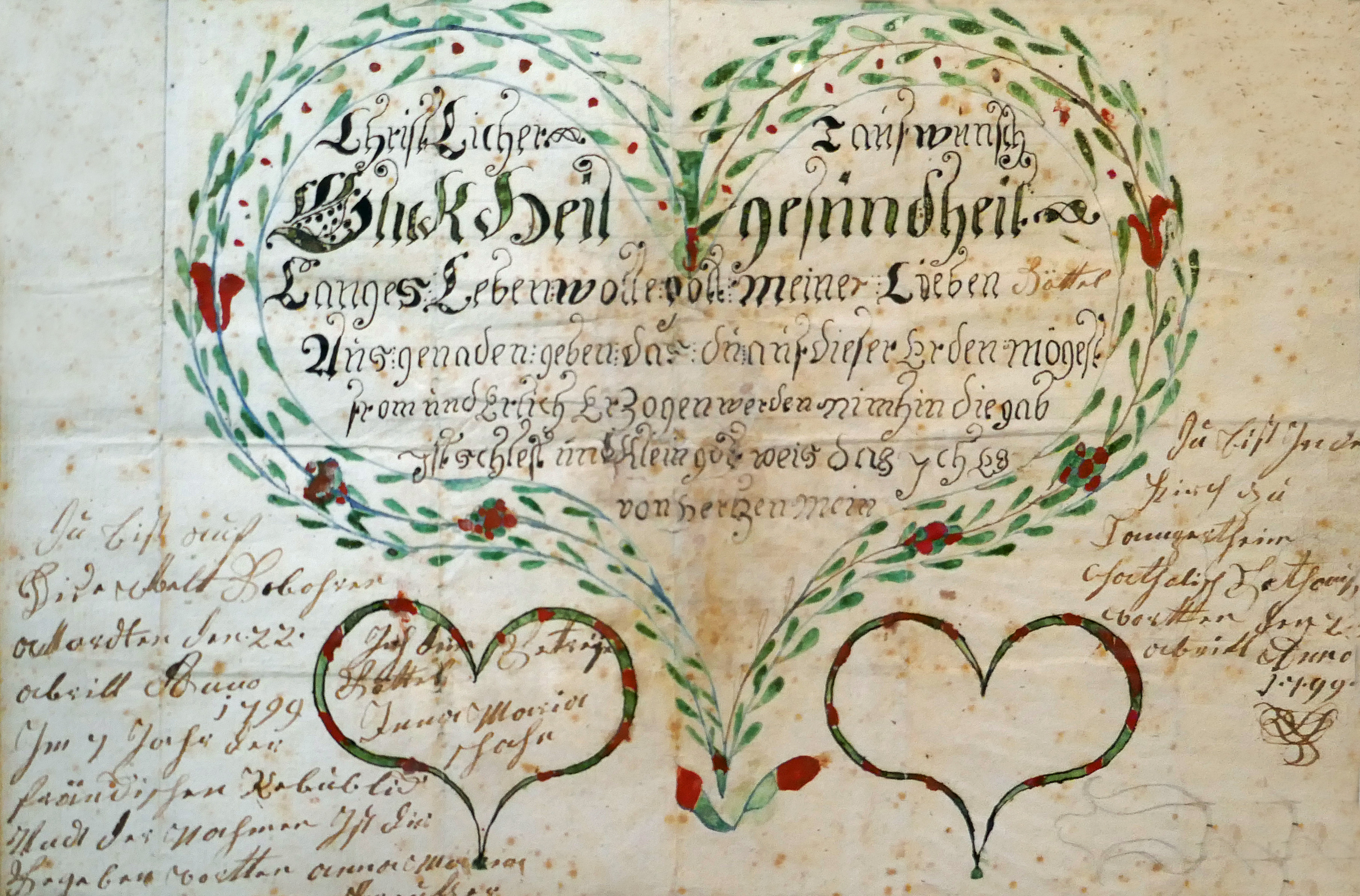 Lettre de baptême catholique, 1799, an VII de la République. L'enfant a été baptisé à l'église catholique de Lampertheim. Les lettres de baptême catholiques sont beaucoup plus rares que les protestantes. Exposition Vies protestantes : le mot et l'image au Musée alsacien de Strasbourg (2017).